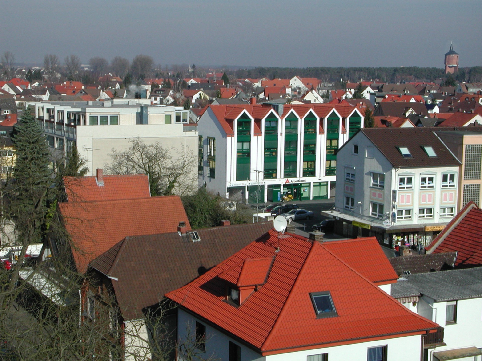 Rodgau-Jügesheim Ortsansicht